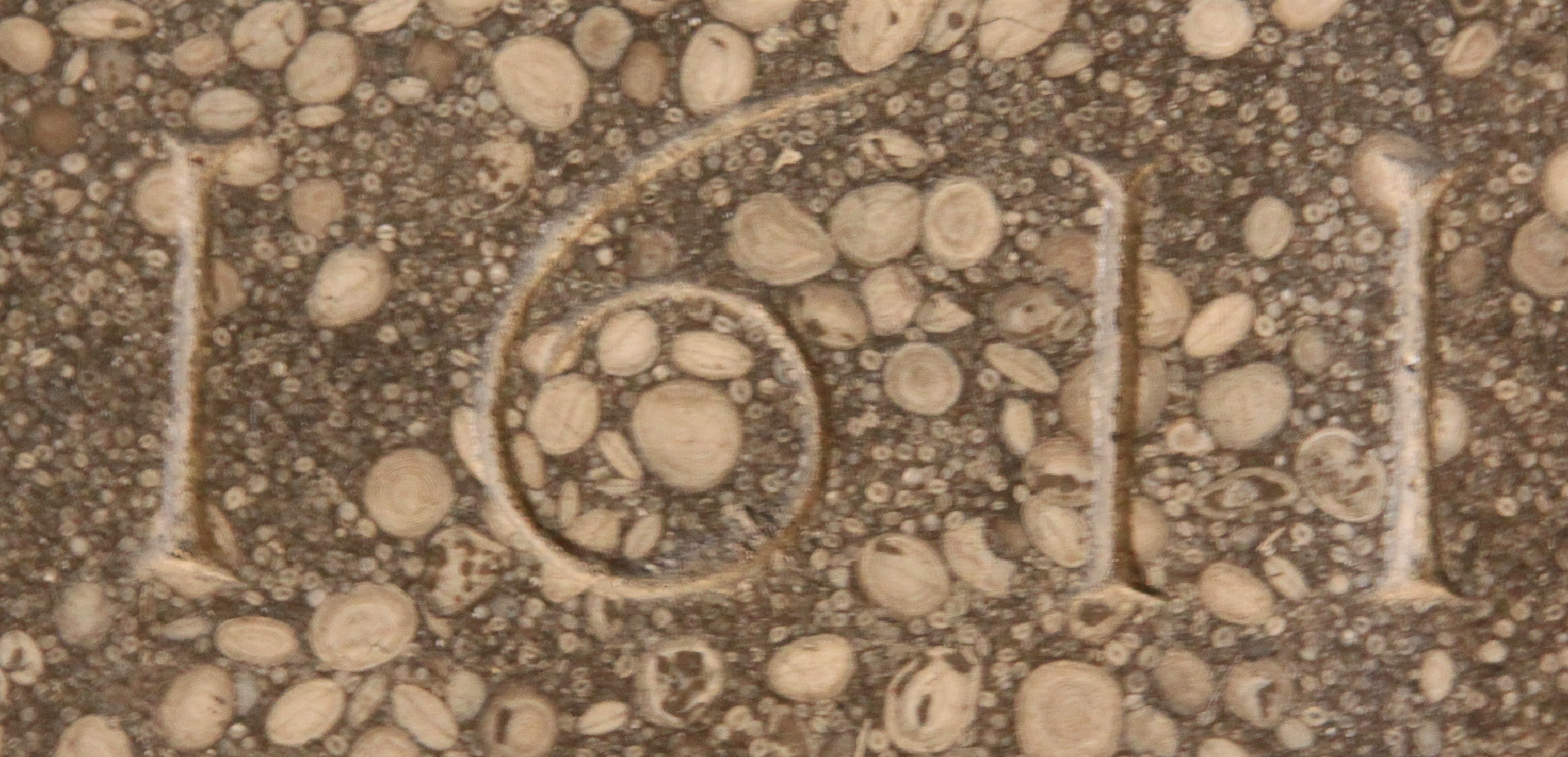 Fragment d'una làpida del monestir de Sant Pere de Besalú amb la inscripció de l'any 1611